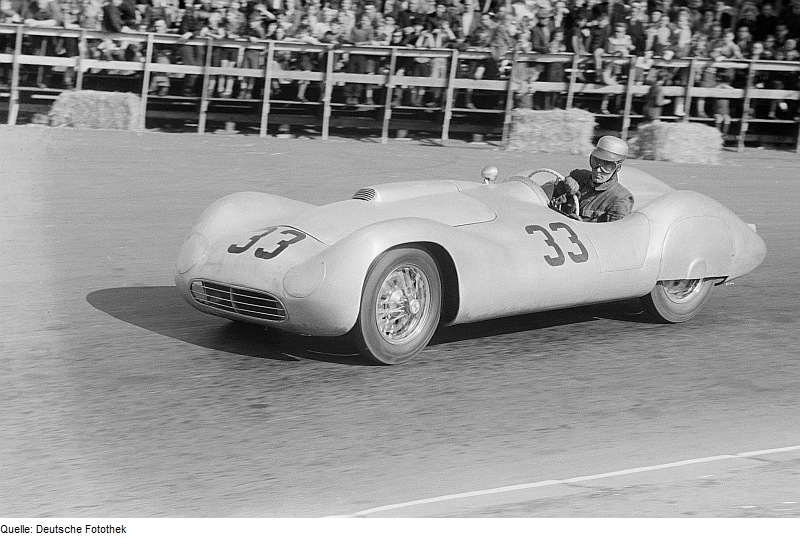 Original image description from the Deutsche Fotothek Automobilrennfahrer in seinem Wagen mit der Nummer 33 beim 6. Leipziger Stadtparkrennen